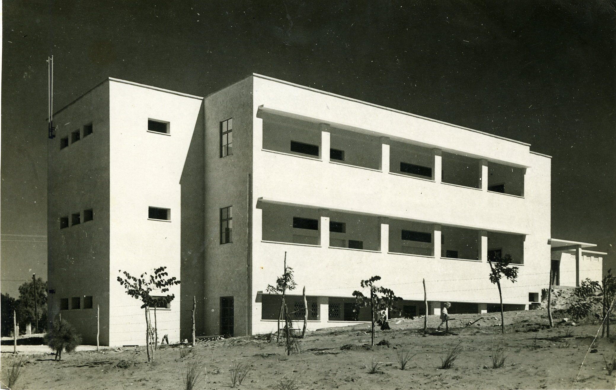 הקיר המערבי של בית הספר ויצמן בשנות החמישים באדיבות אוסף התצלומים של ארכיון בית ראשונים"- מוזיאון לתולדות הרצליה